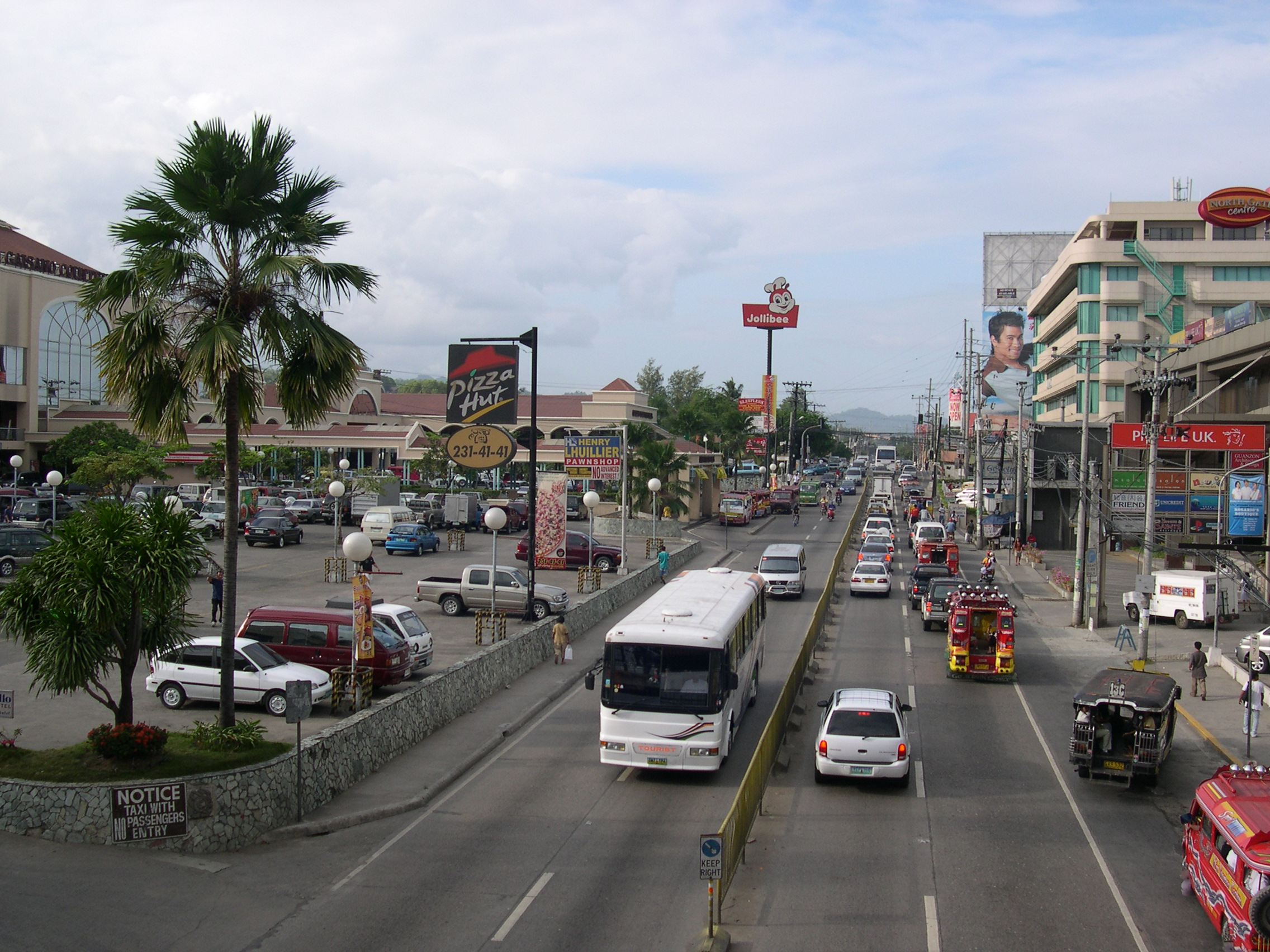 M. Cuenco Avenue, Cebu City